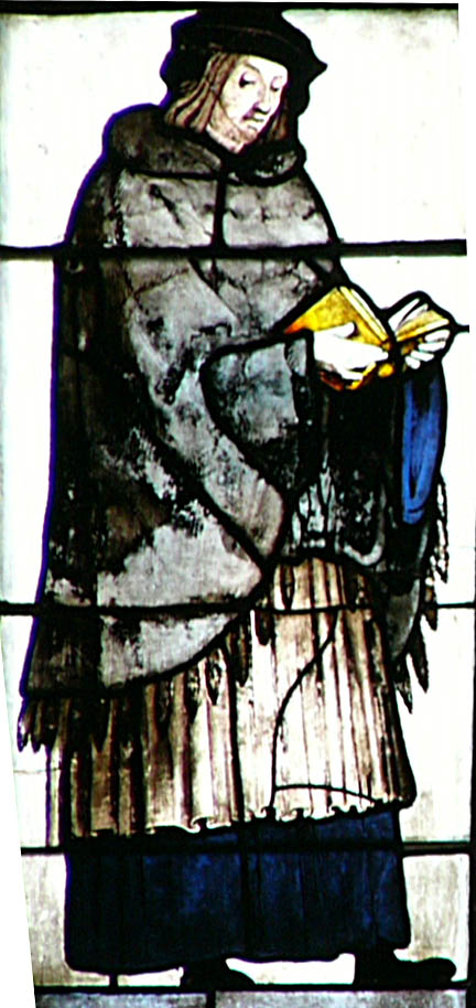 Ausschnitt aus dem Markgrafenfenster von St. Sebald in Nürnberg: Markgraf Friedrich